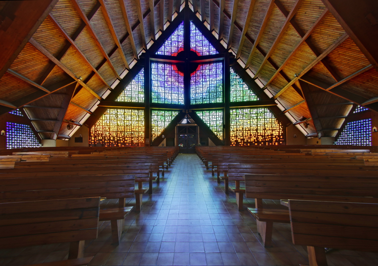 Vitraux de l'Eglise de Ravine Blanche (Saint-Pierre) par Guy Lefèvre